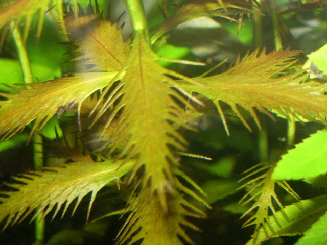 Proserpinaca palustris